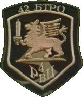 Емблема 25-го батальйону ТрО ЗСУ «Рух Опору» Кіровоградської області.